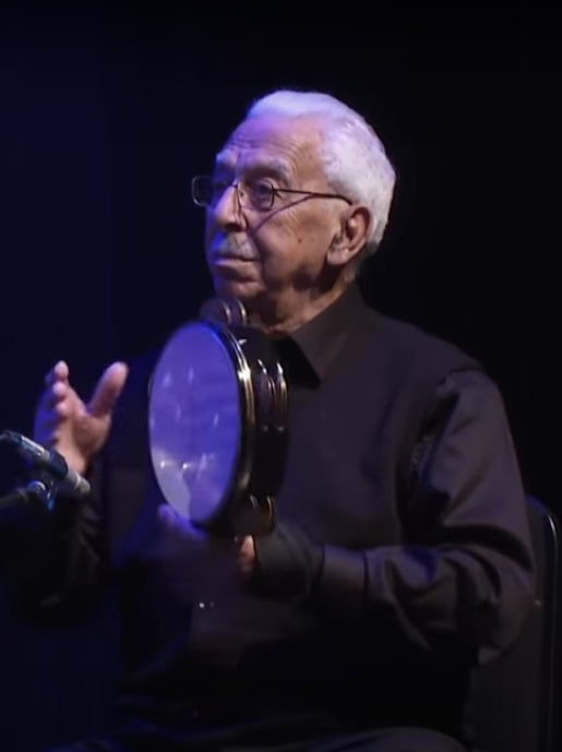 Percusionista Libanés